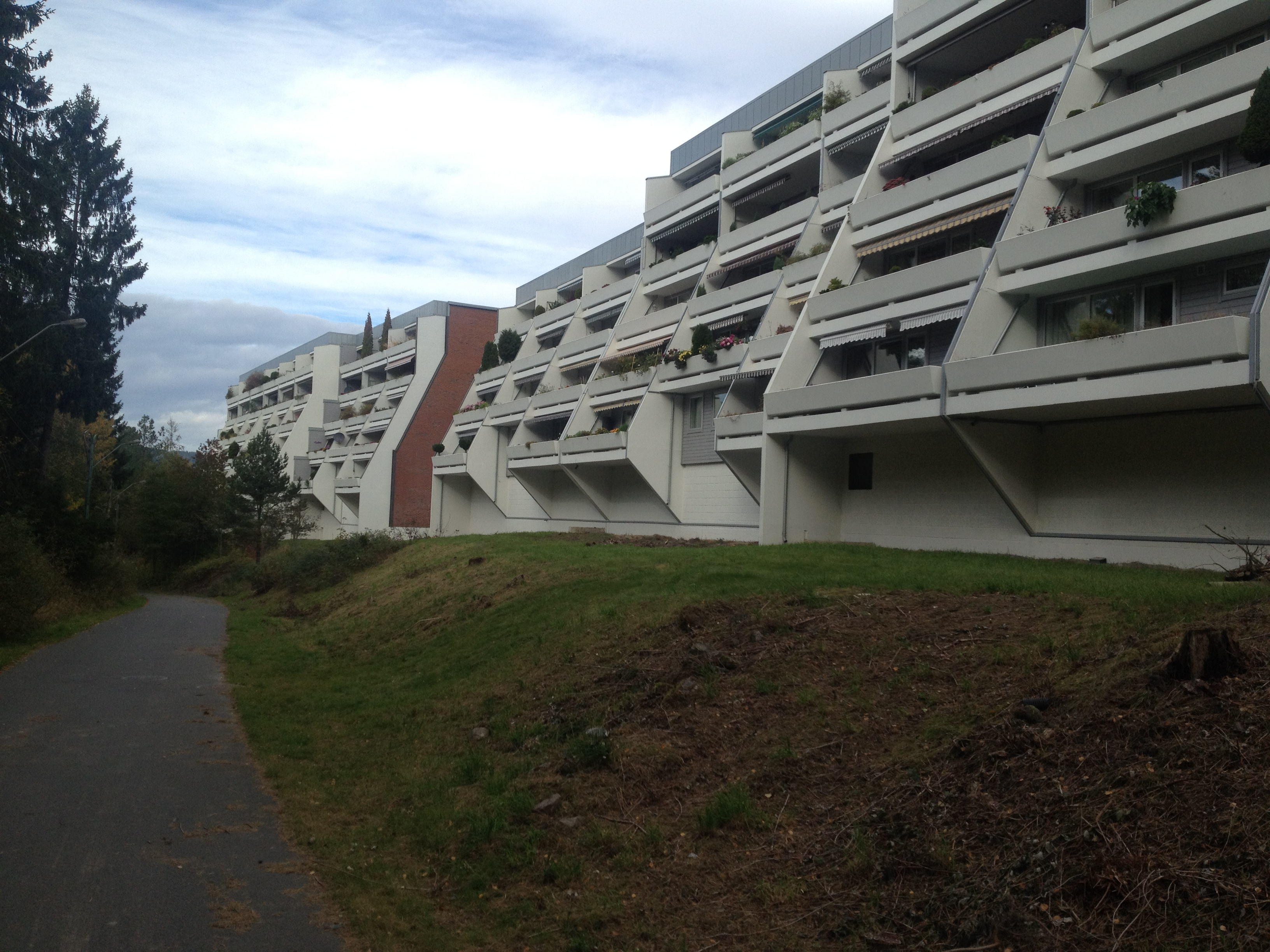 Skansen Terrasse på Ellingsrud.